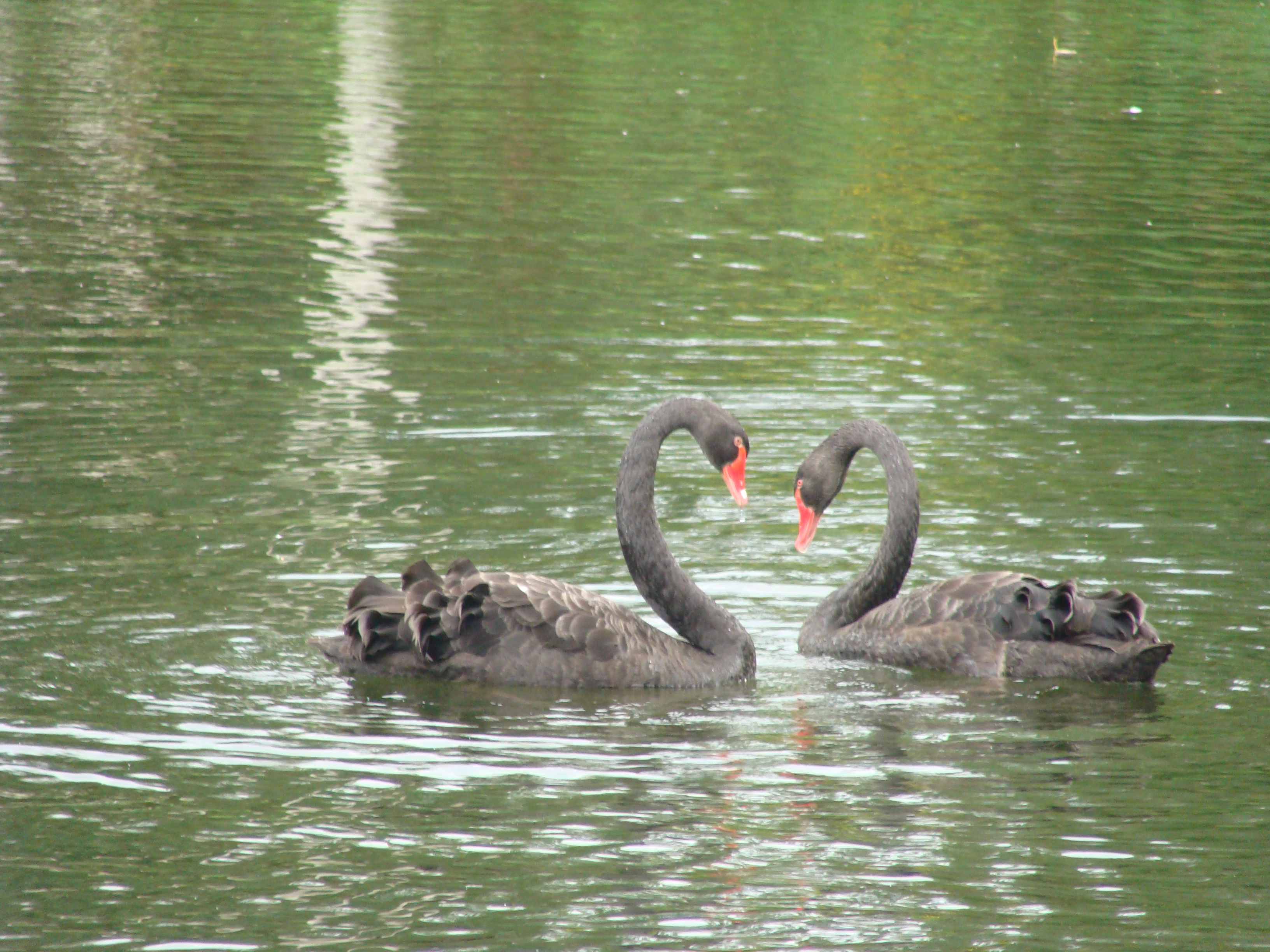 Сормовский парк культуры и отдыха (Нижегородская область, Нижний Новгород, Сормовский парк культуры и отдыха)